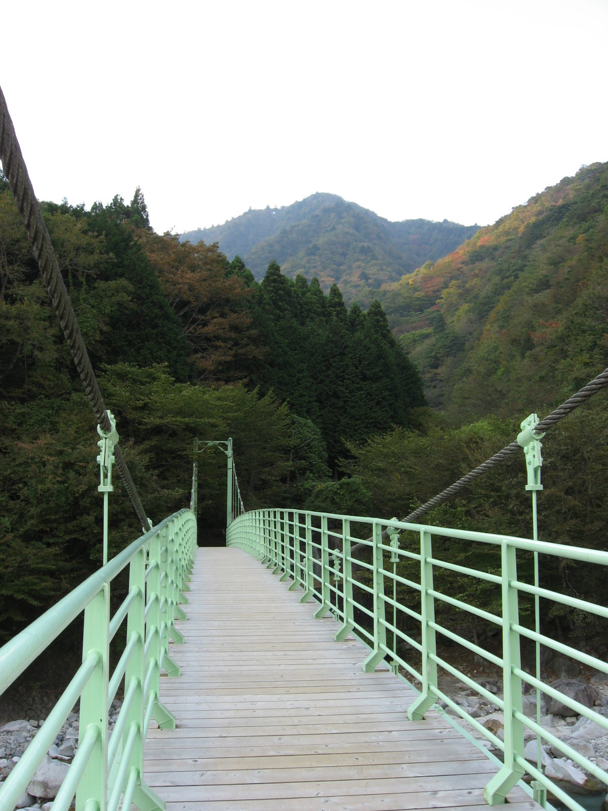 西丹沢自然教室付近の吊り橋から望む畦ヶ丸。